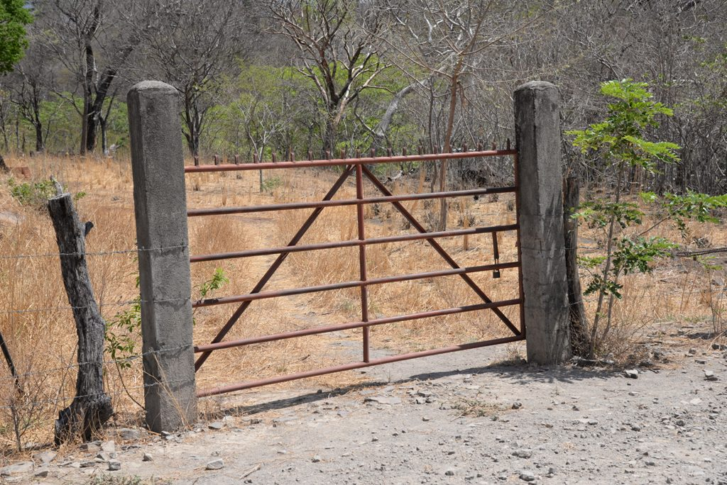 Puerta en San Antonio, Achuapa, Nicaragua.